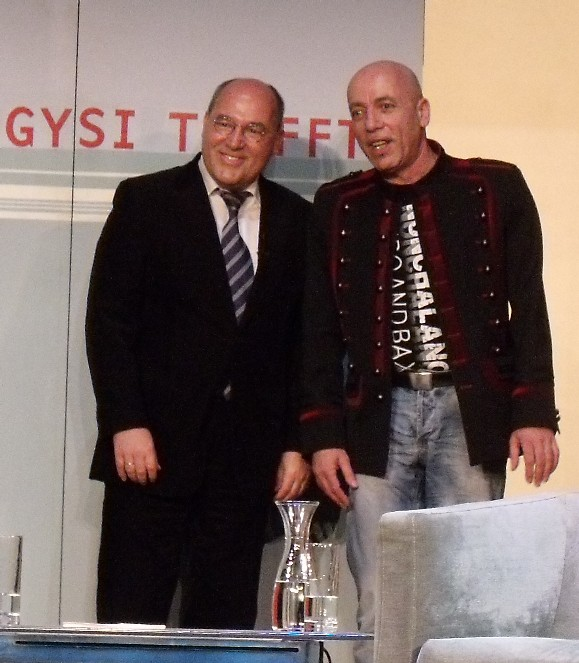 Moderator Gregor Gysi mit seinem Gast Toni Krahl im Rahmen seiner Veranstaltungsreihe "Gysi trifft..." im Deutschen Theater, Berlin.